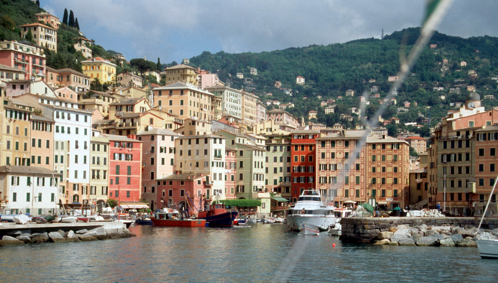 Camogli 2004